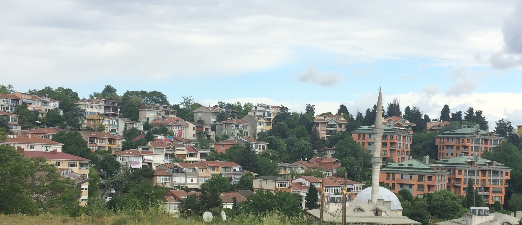 Kültür Mahallesi